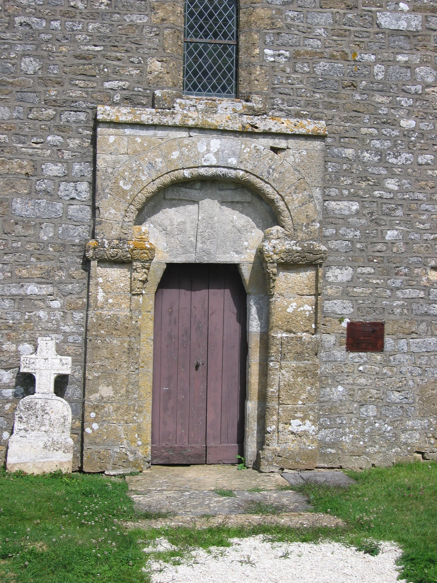 Entrée Église Notre-Dame de Malmy, commune de Chémery-sur-Bar, en Ardennes, France